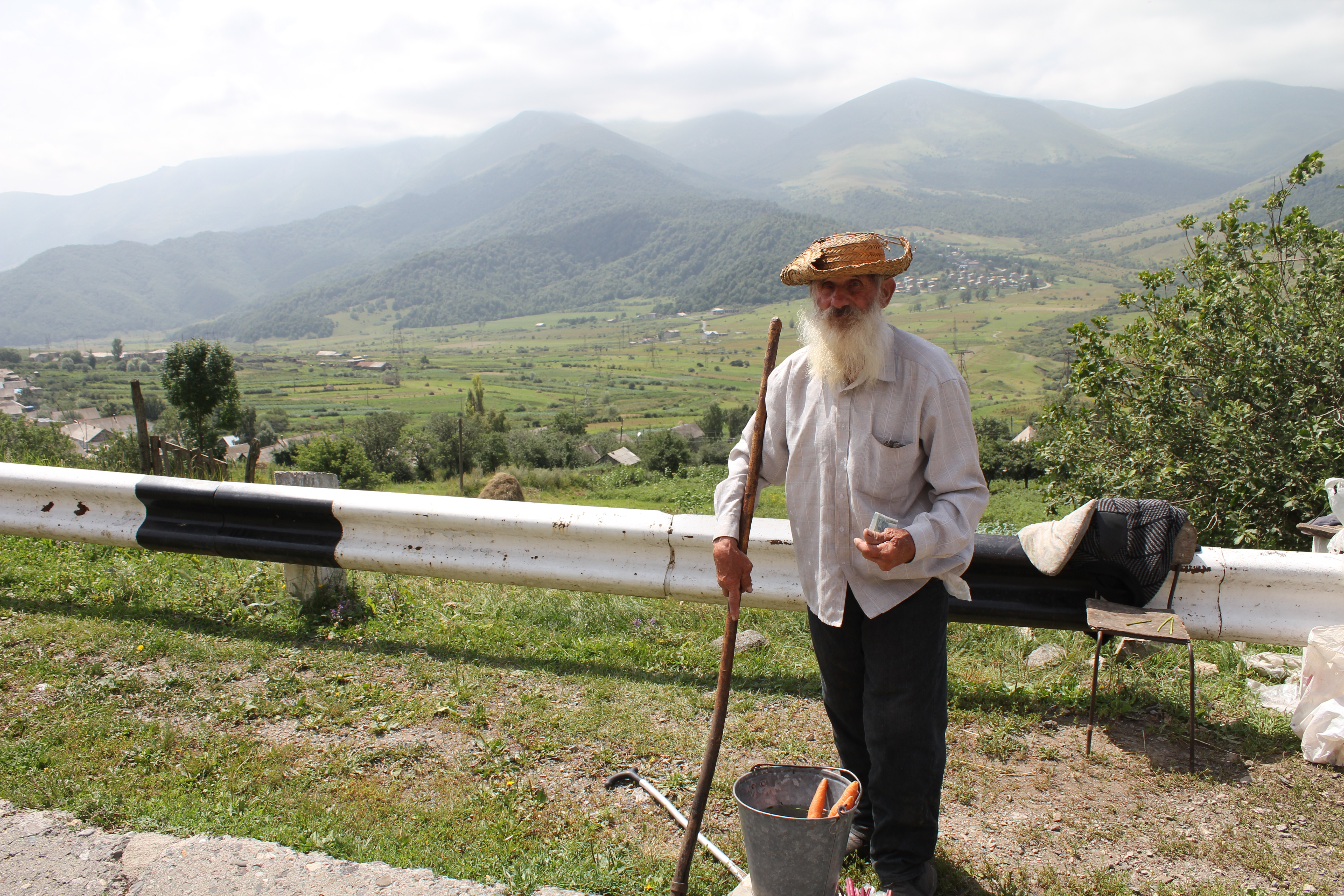 Русский-молокан из села Лермонтово (Армения) продаёт морковь